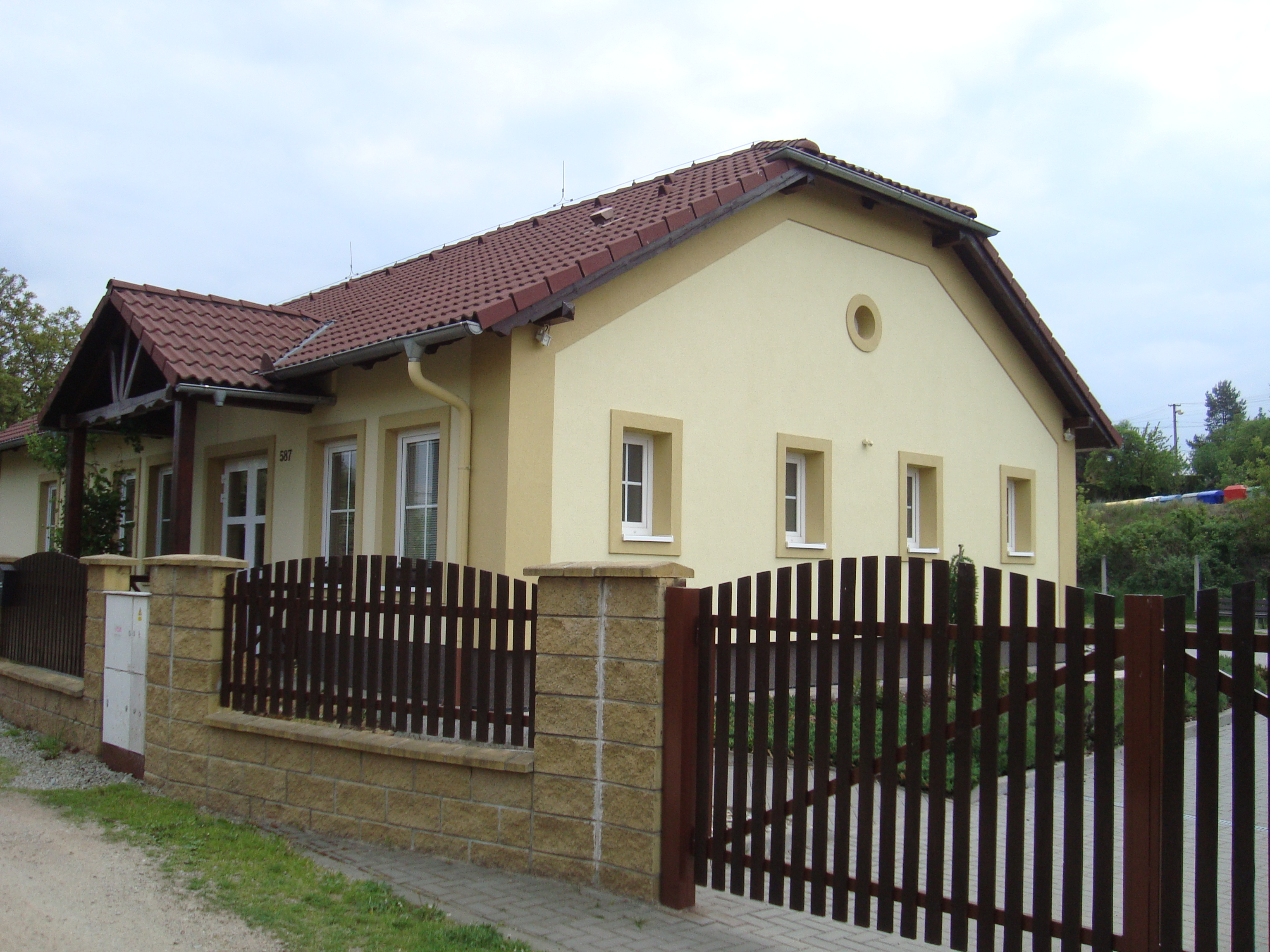 Sál království v Zastávce